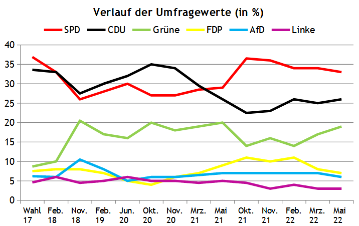 Umfragen zur Landtagswahl Niedersachsen 2022